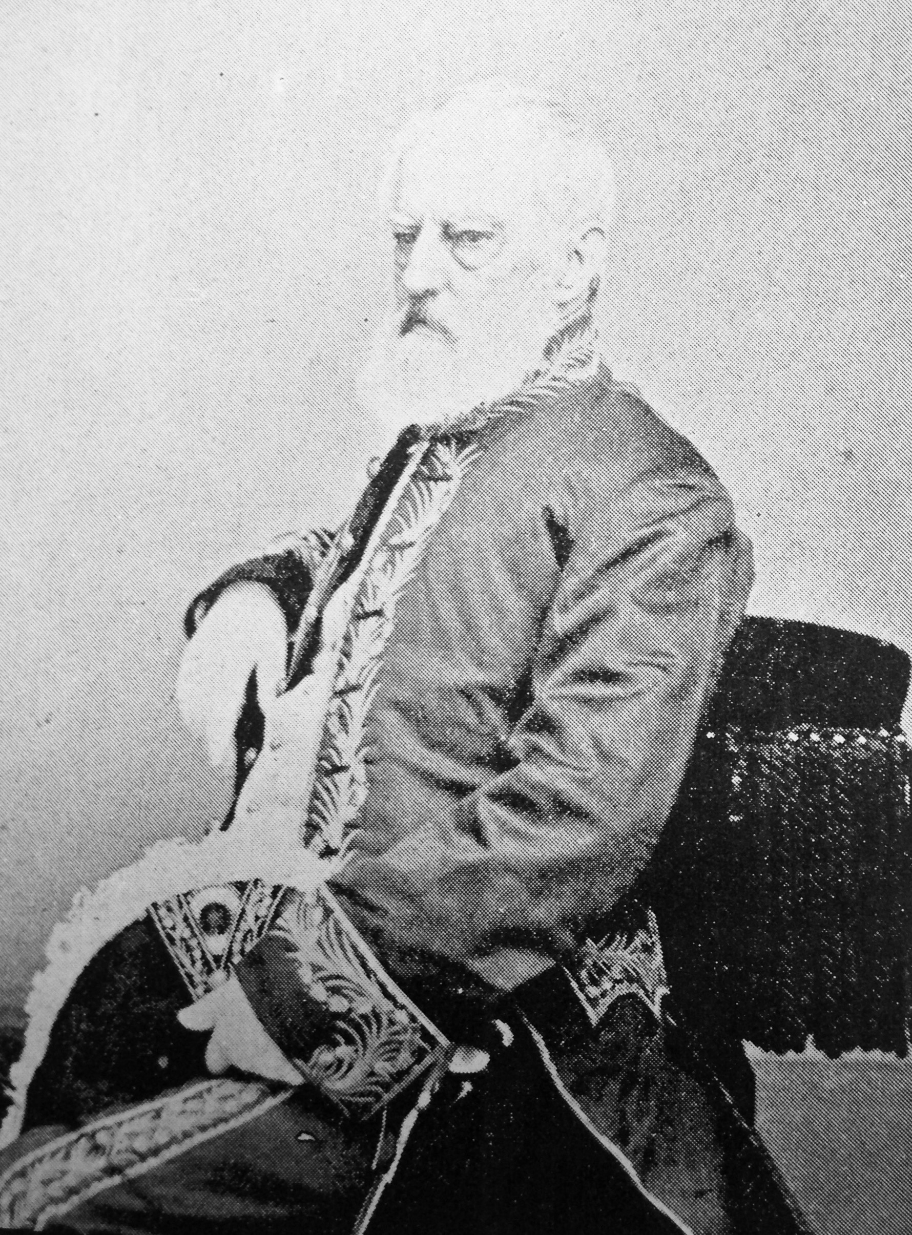 Fotografía de Antonio José de Irisarri, de los fotógrafos Díaz y Spenser, de Santiago de Chile.